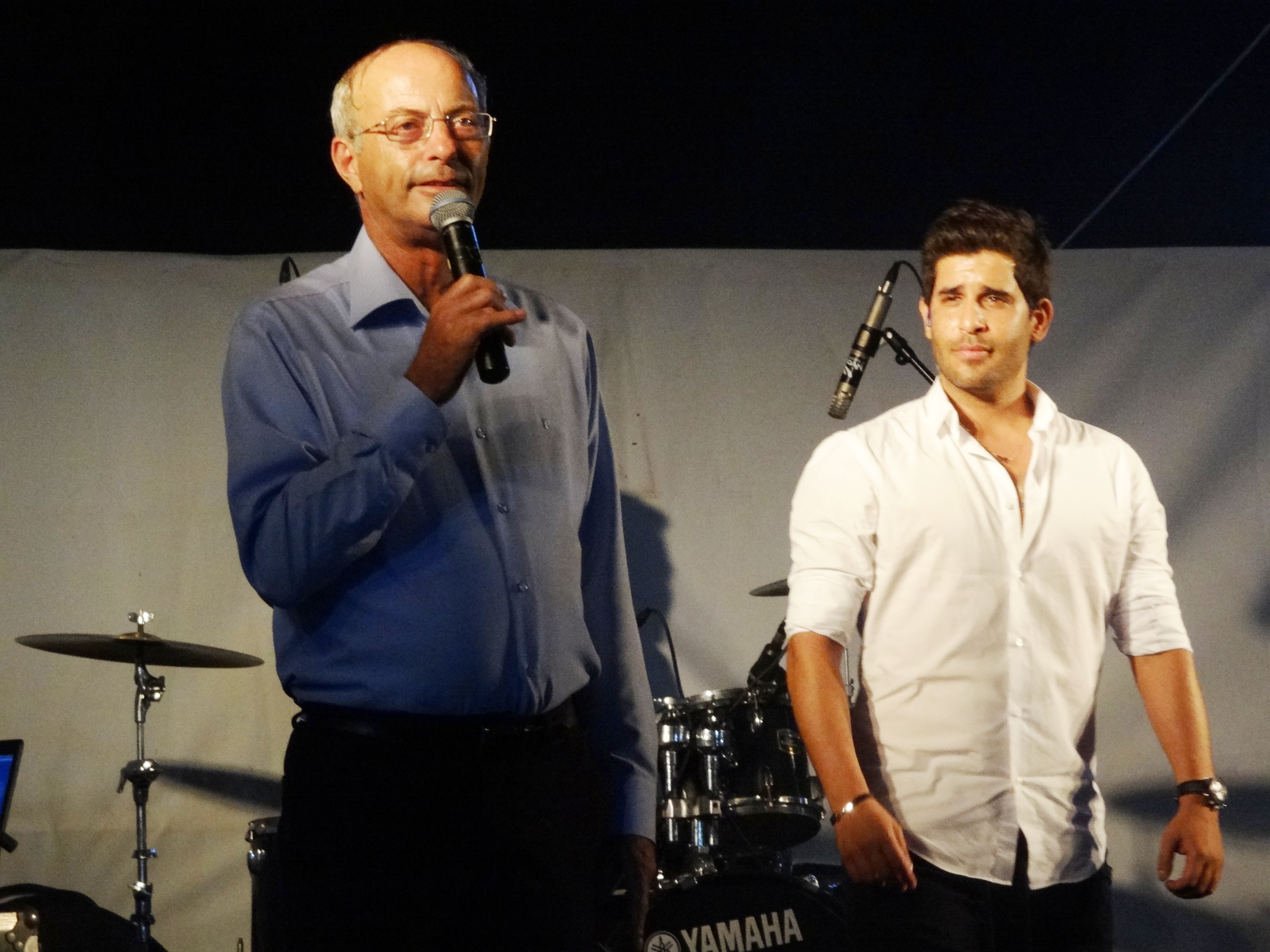 הזמר פאר טסי בהופעה בעיר הנוער 2014 בעיר נשר ברכות של אבי בינמו ראש העירייה